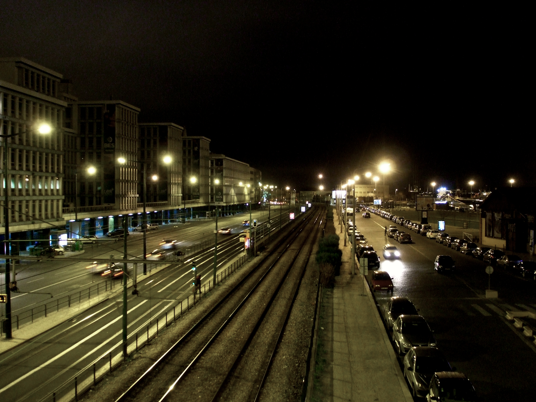 Via férrea: Linha de Cascais [PK 1] Local: Lisboa Data e hora: 6 de Março de 2009 [21h46] Sentido: Cais do Sodré